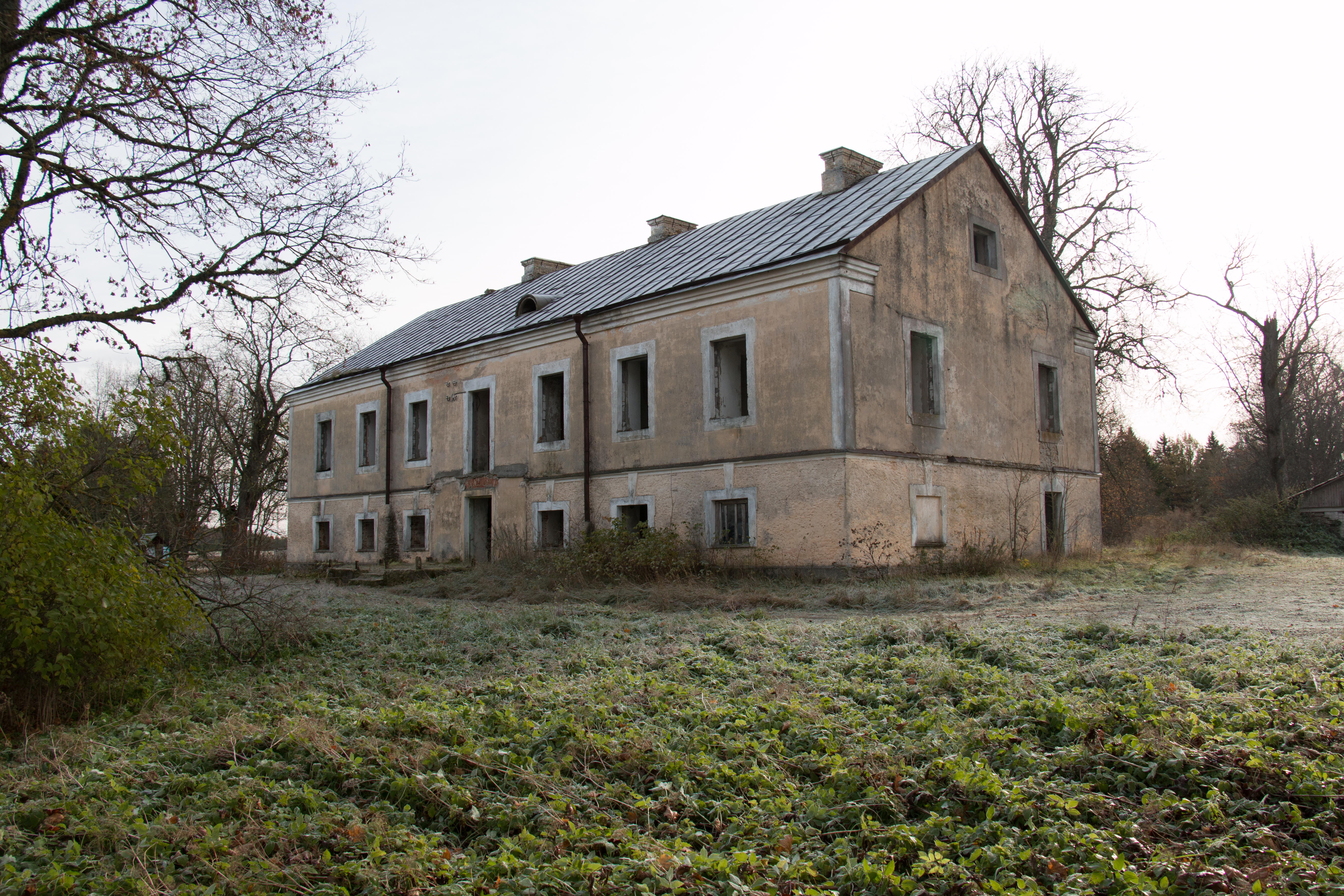 Üksnurme mõisa härrastemaja